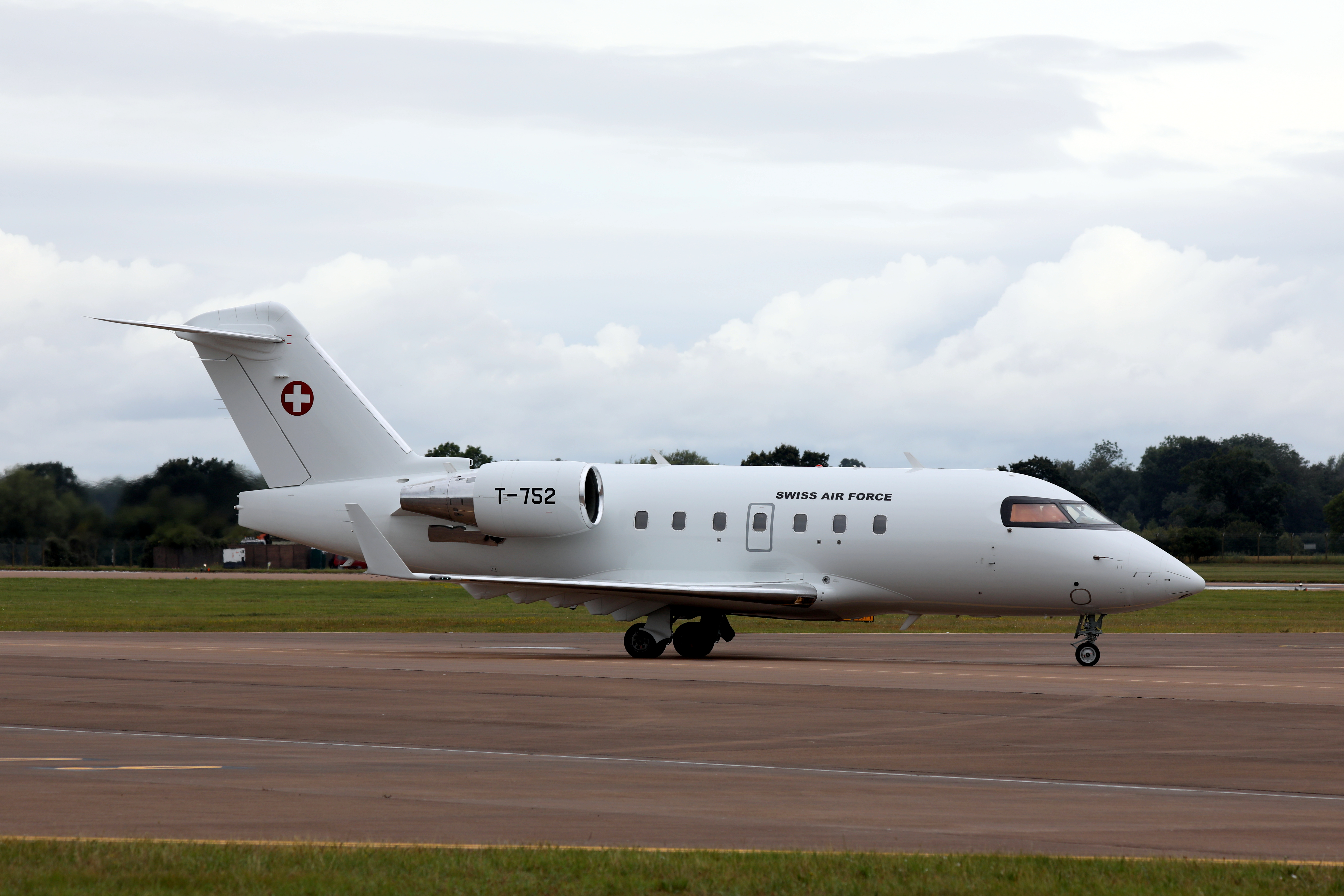 1P4A6330